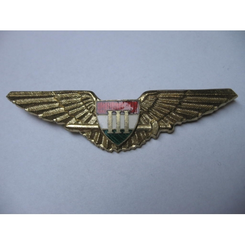 Magyar Légierő - III. osztályú repülőgépvezető